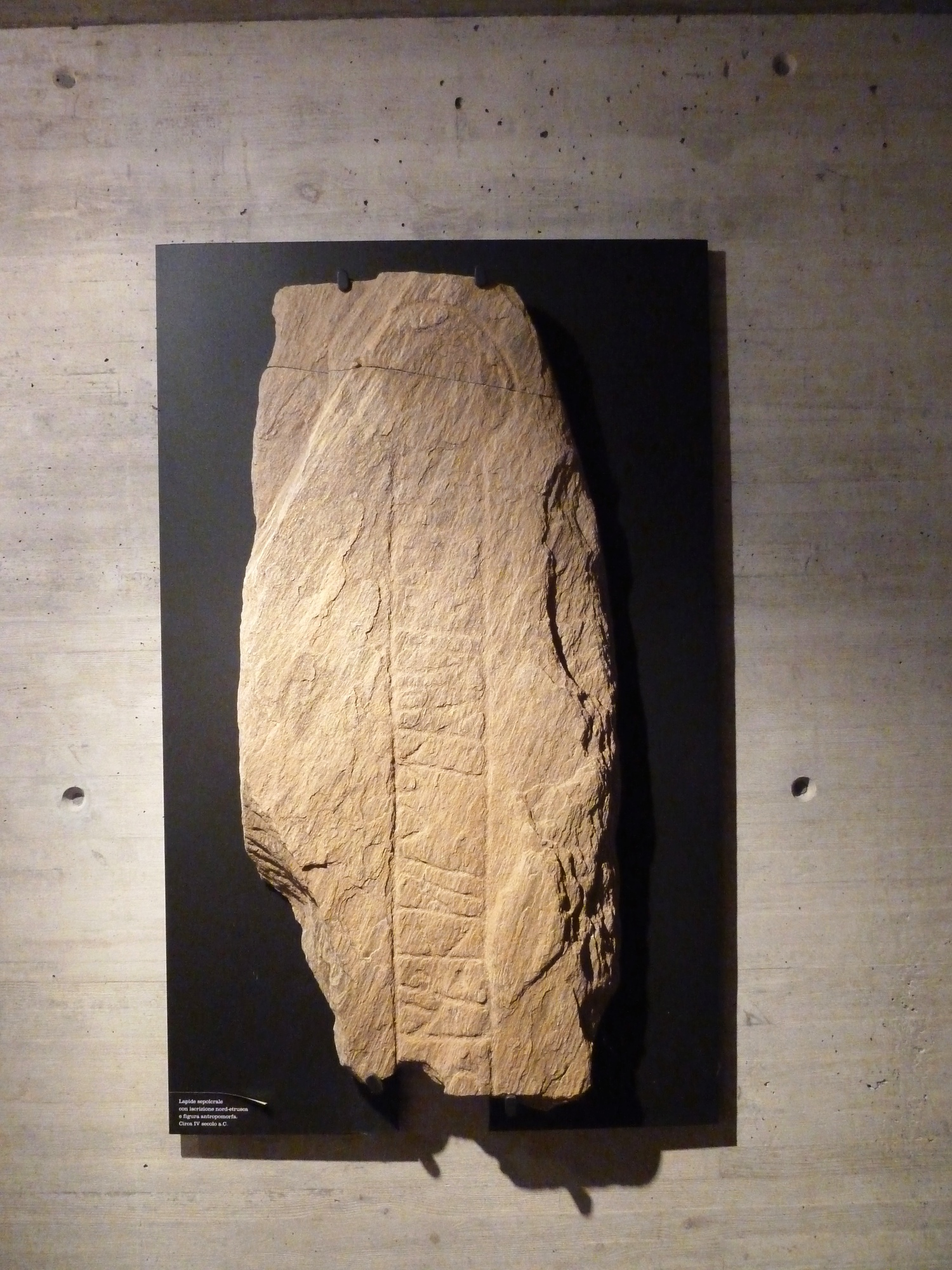 Stele etrusca conservato nel sito coperto di San Maurizio di Bioggio